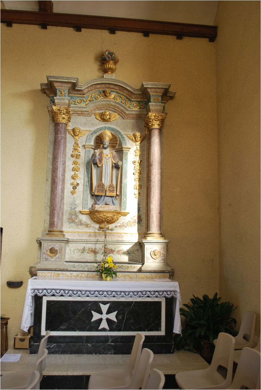 Autel latéral droit de l'église Saint-Siméon de L'Huisserie